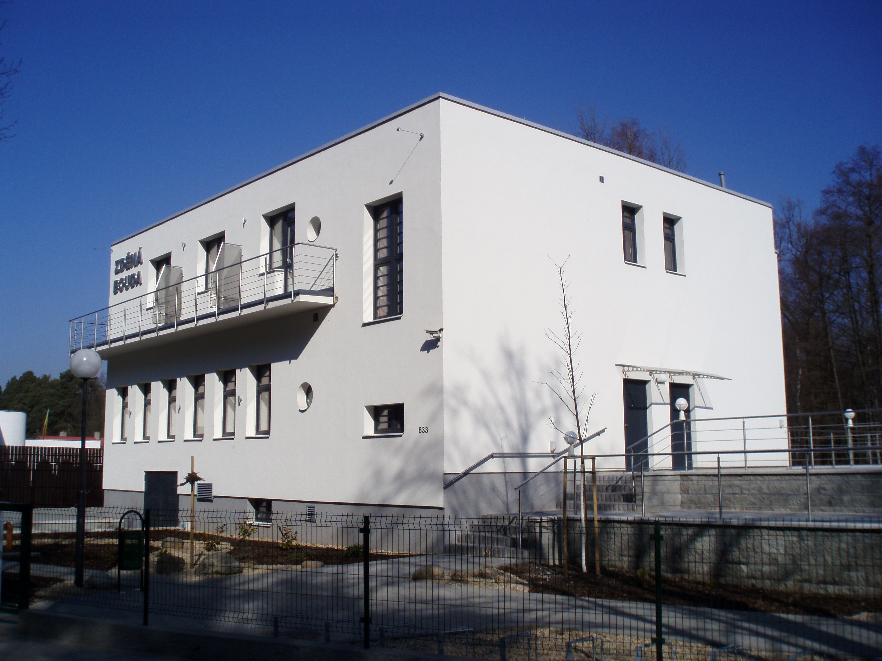 Zděná bouda (Hradečnice 633/1, Hradec Králové-Nový Hradec Králové)